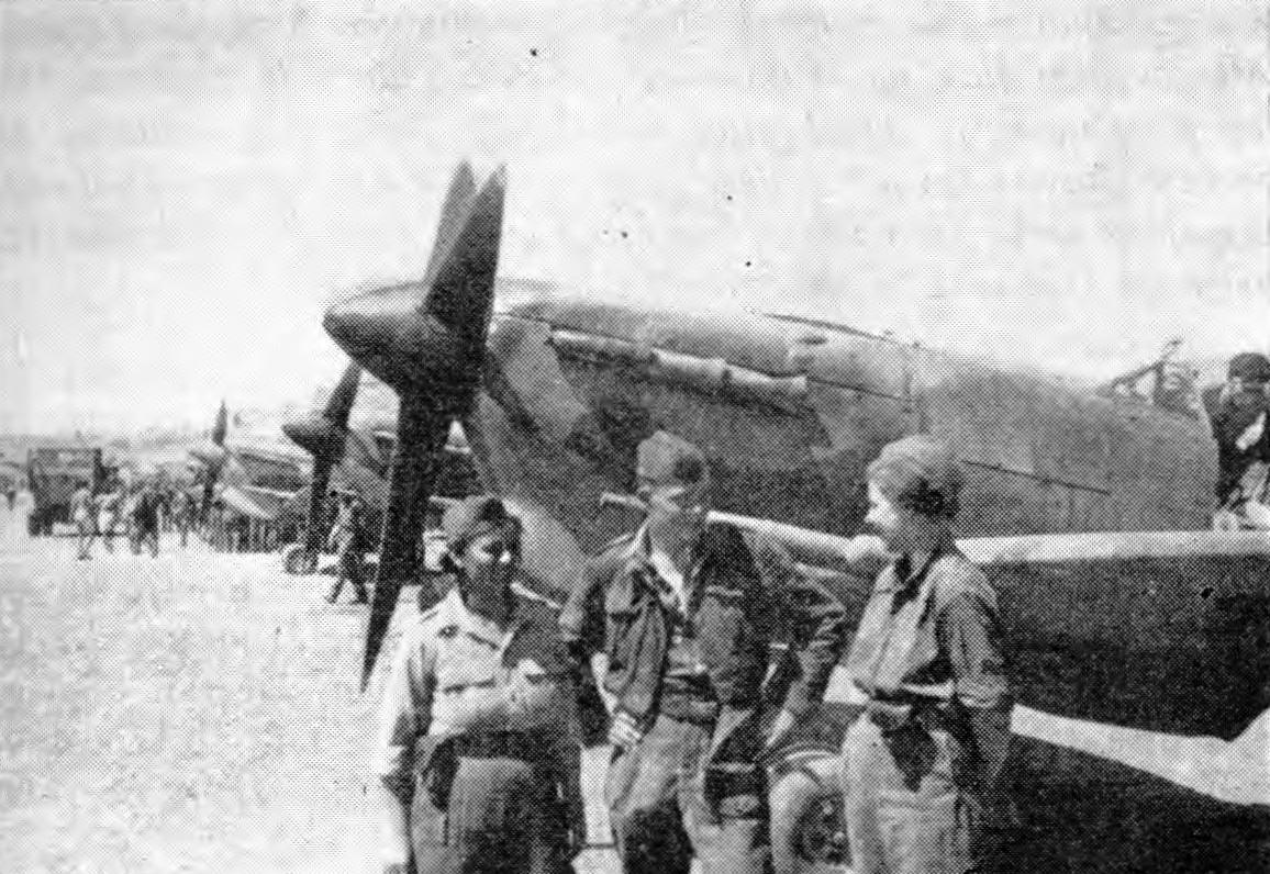 Prva lovska eskadrilja na letališču Vis leta 1944